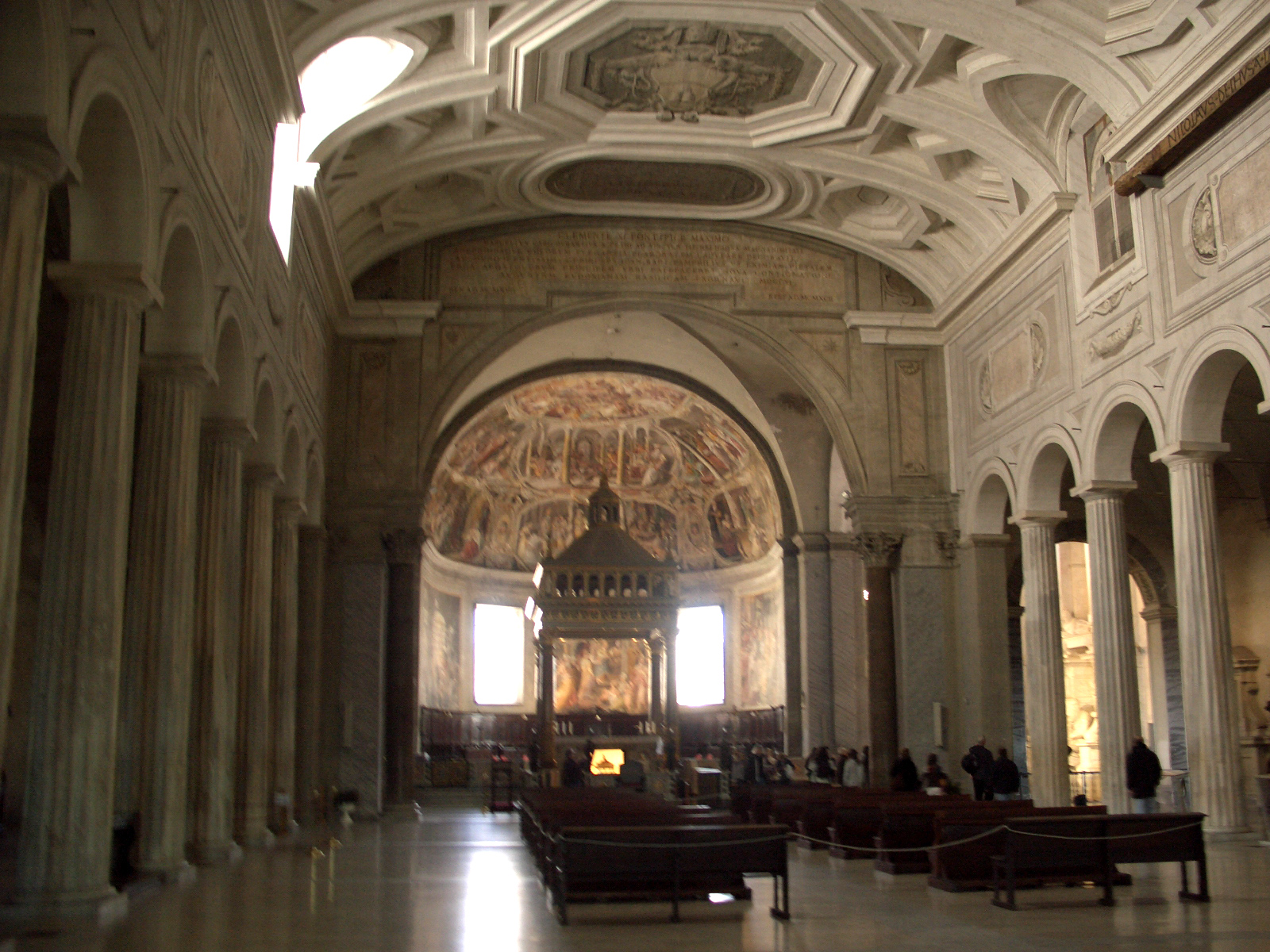 Roma, Italia